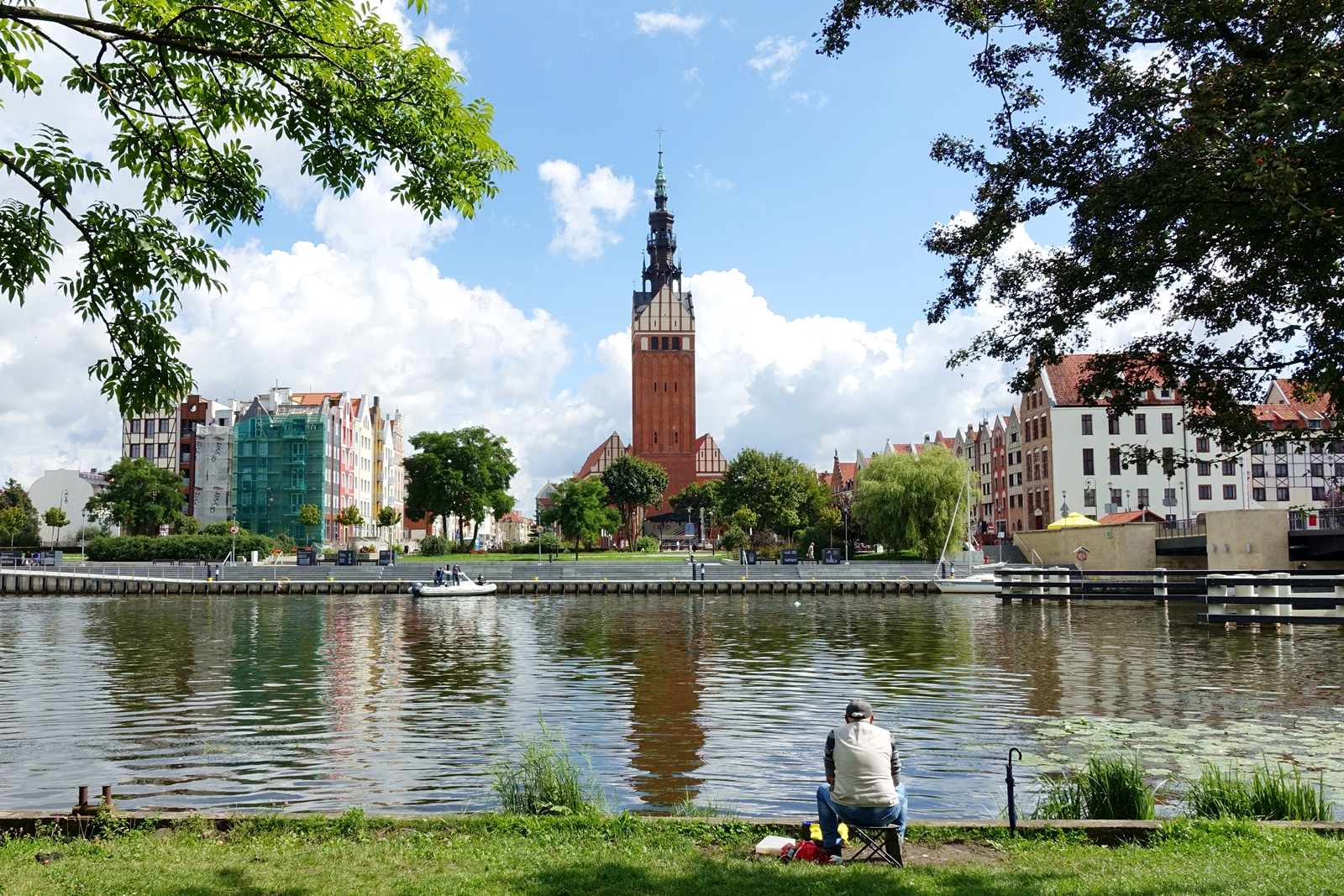 Elbląg - Widok na Stare Miasto zza rzeki Elbląg